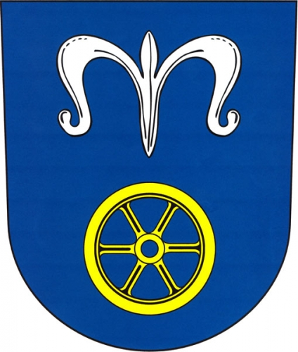 znak,Okříšky , okres Třebíč